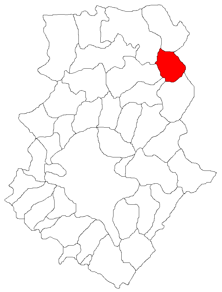 Categorie:Hărţi ale judeţului Ilfov